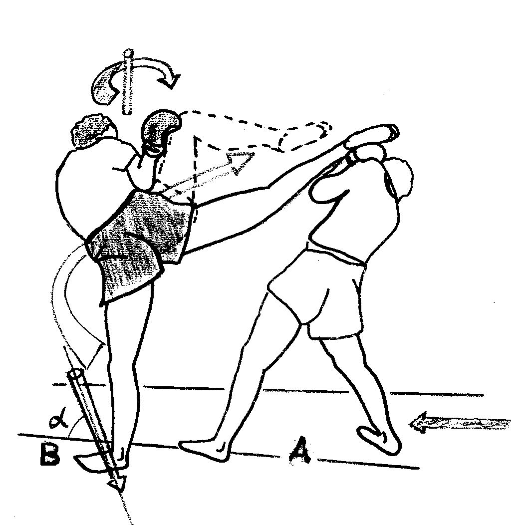 circulaire7.jpg